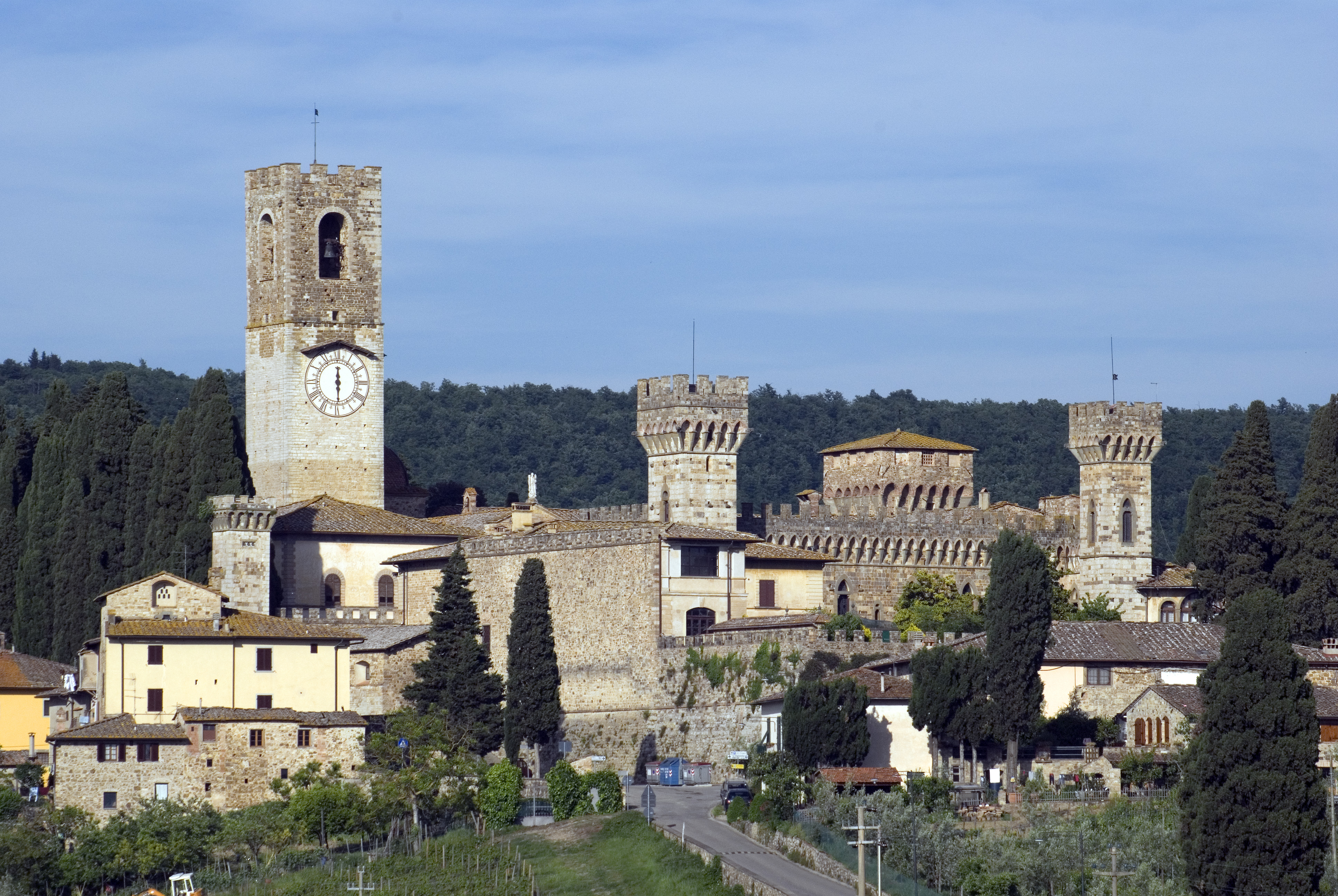 Panorama di Badia a Passignano, Firenze